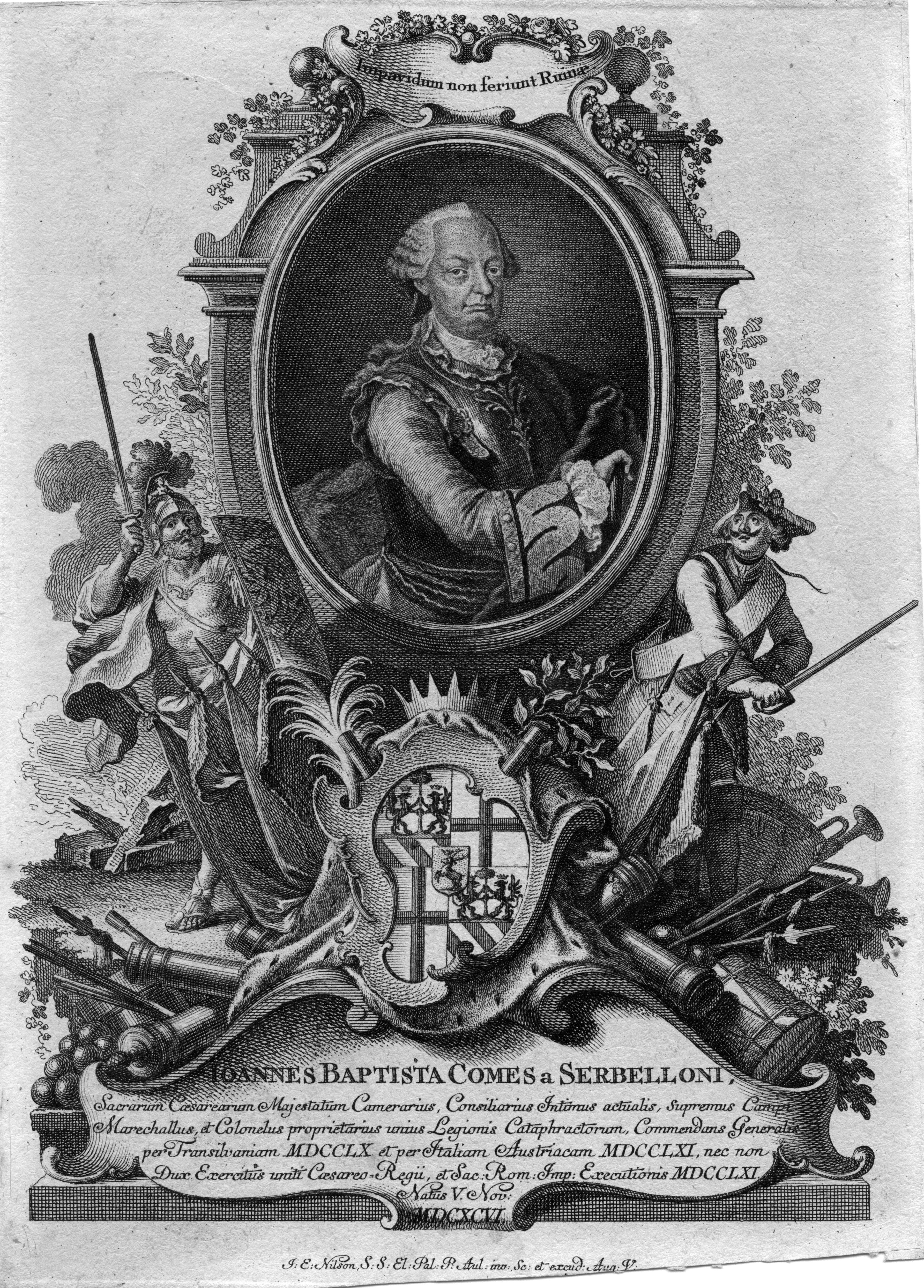 portrait gravé